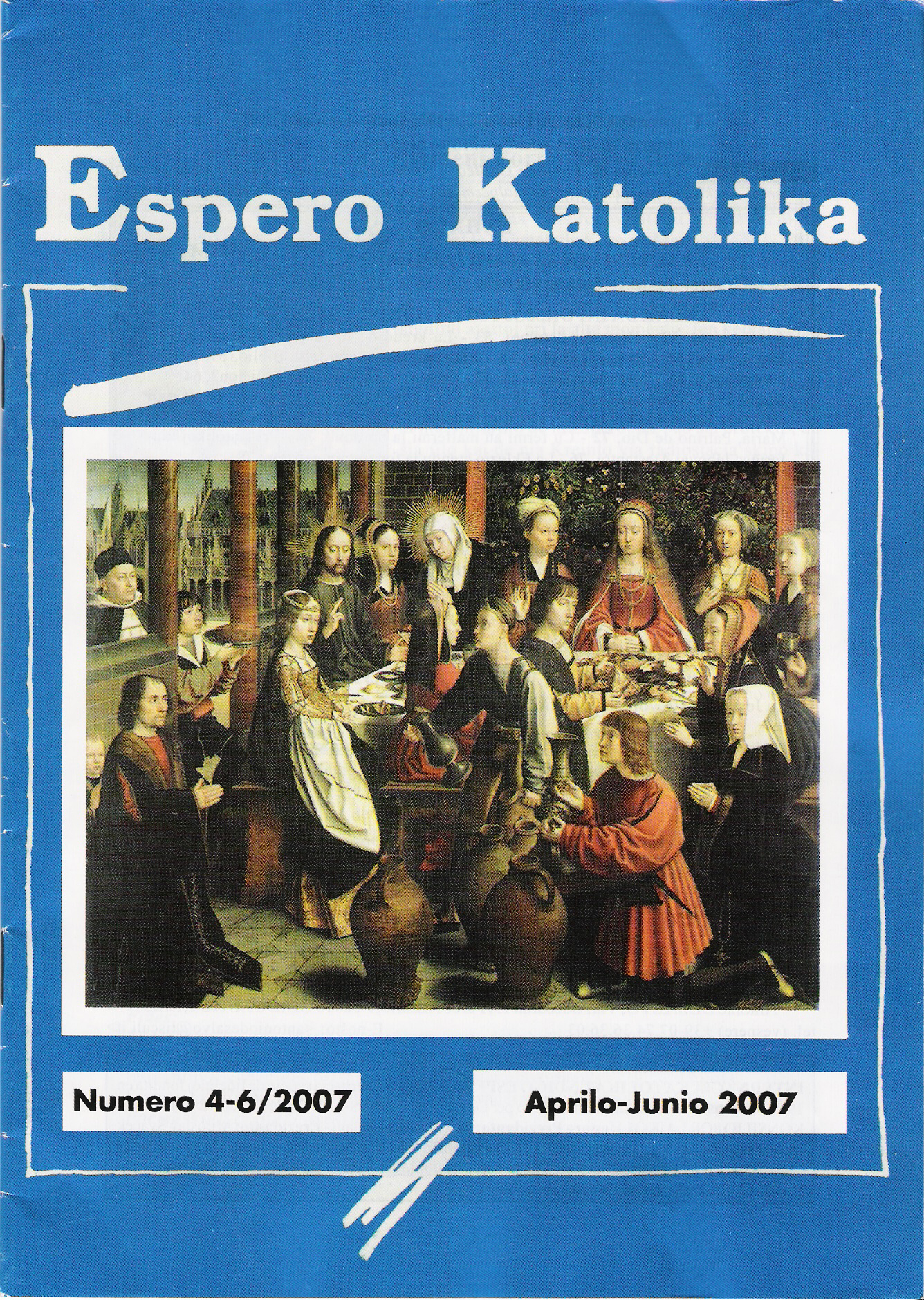 La antaŭkovrilo de Espero Katolika 4–6/2007